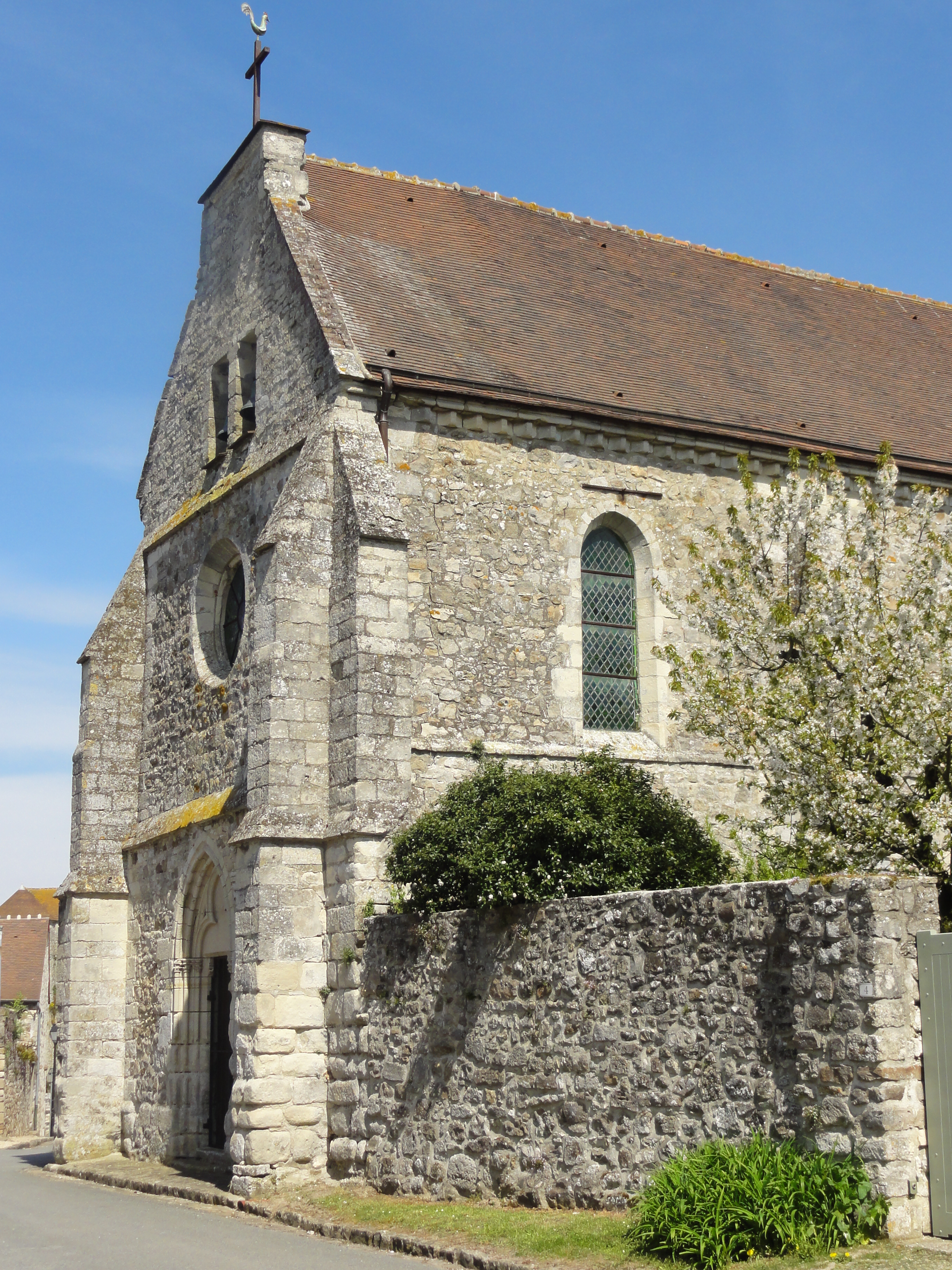 Première travée, vue depuis le sud.